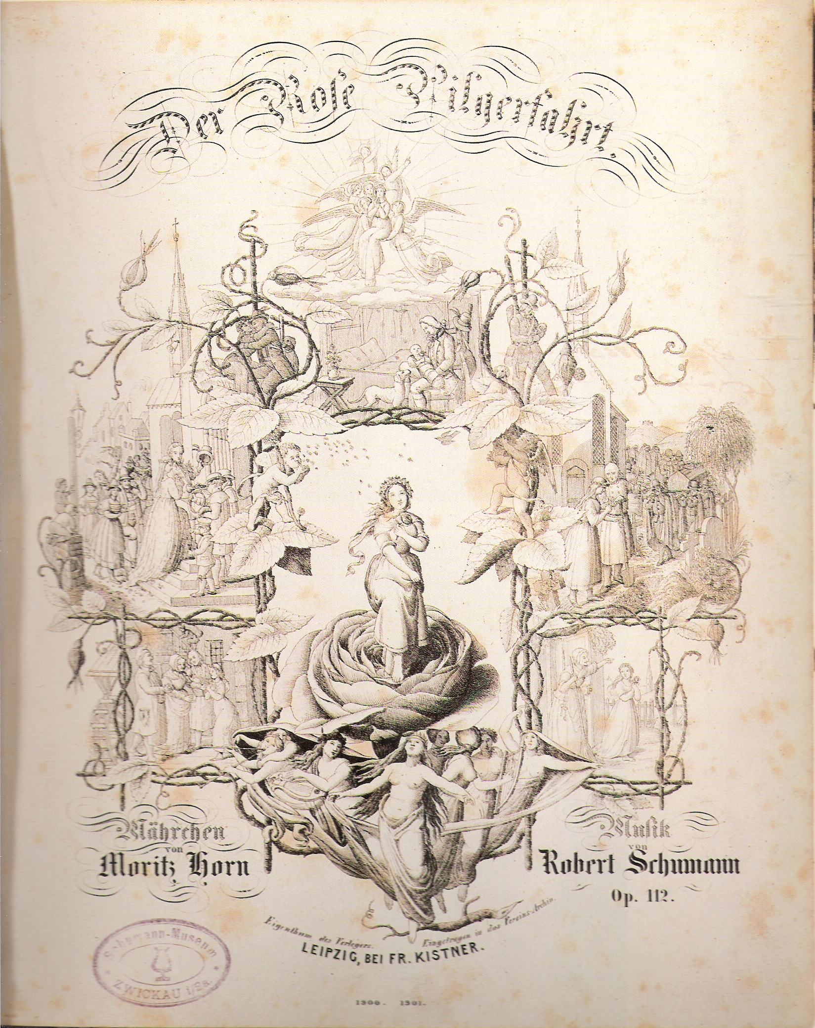 Titelblatt der Erstausgabe (1852) von Robert Schumanns Der Rose Pilgerfahrt op. 112, komponiert 1851.